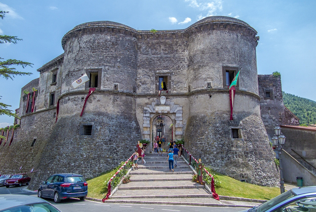 Il castello di Faicchio, in provincia di Benevento